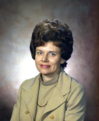 Representative Georgette Valle